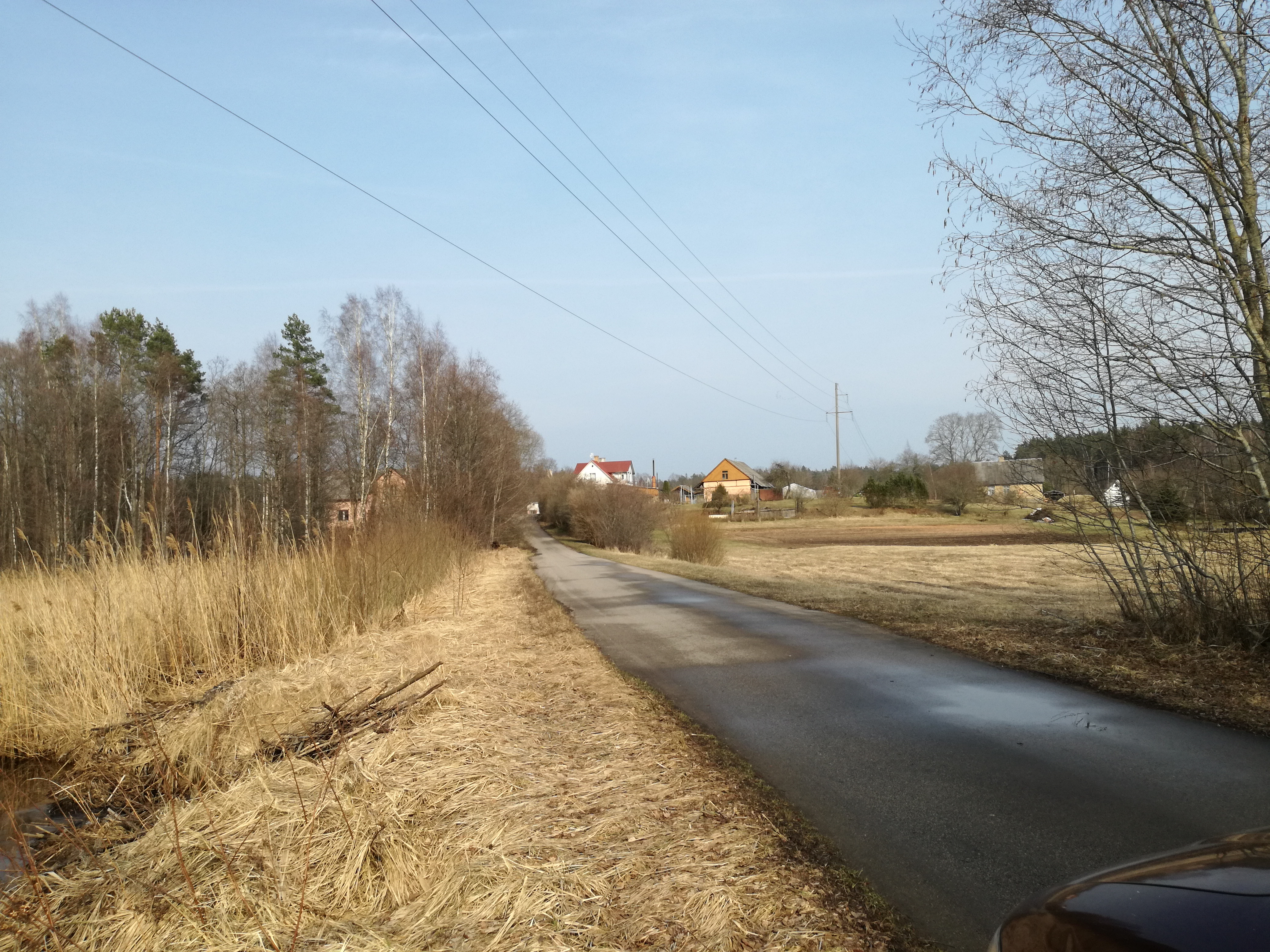 Radziņciema apbūve